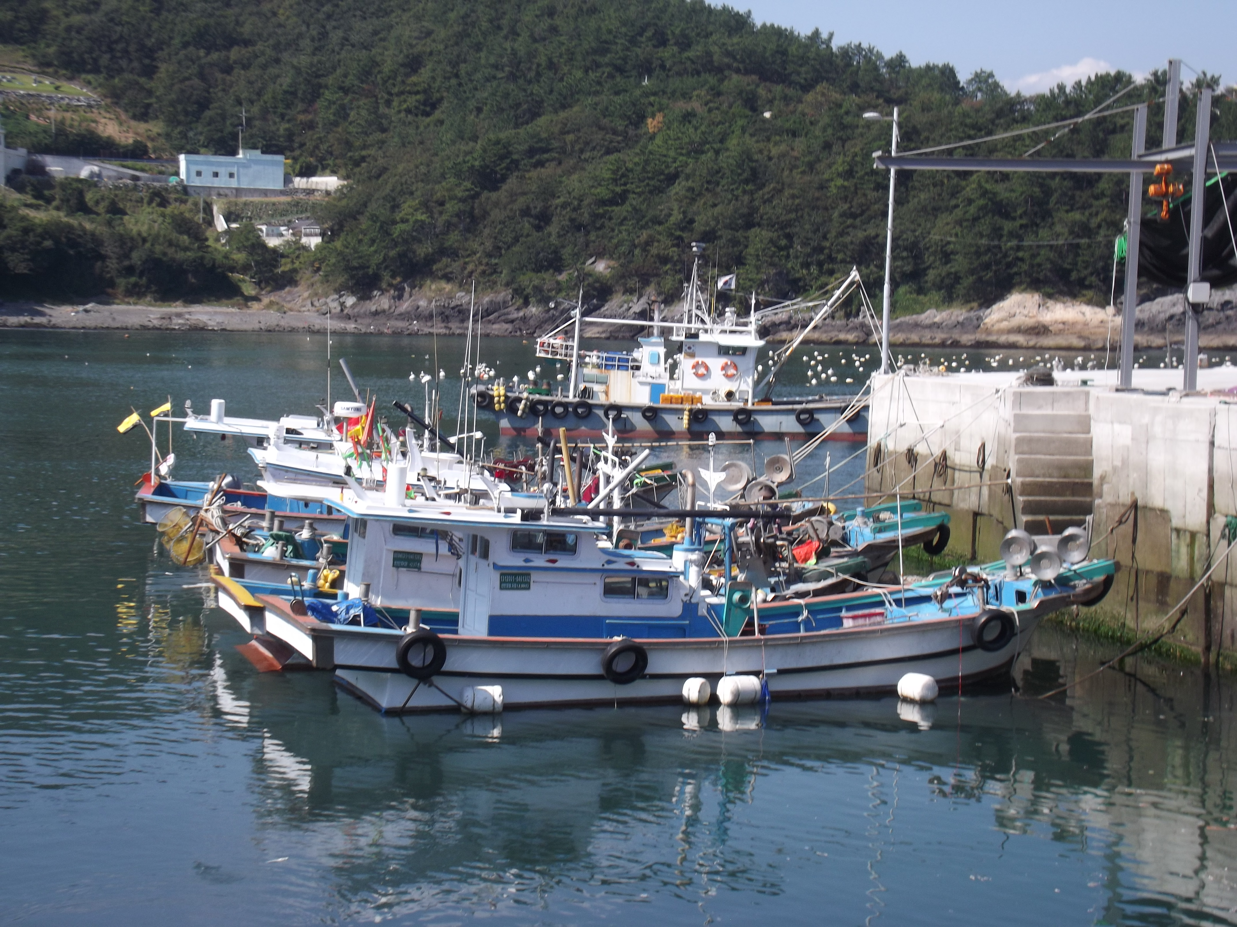 Vissershaven van Yulrim op Dolsando eiland